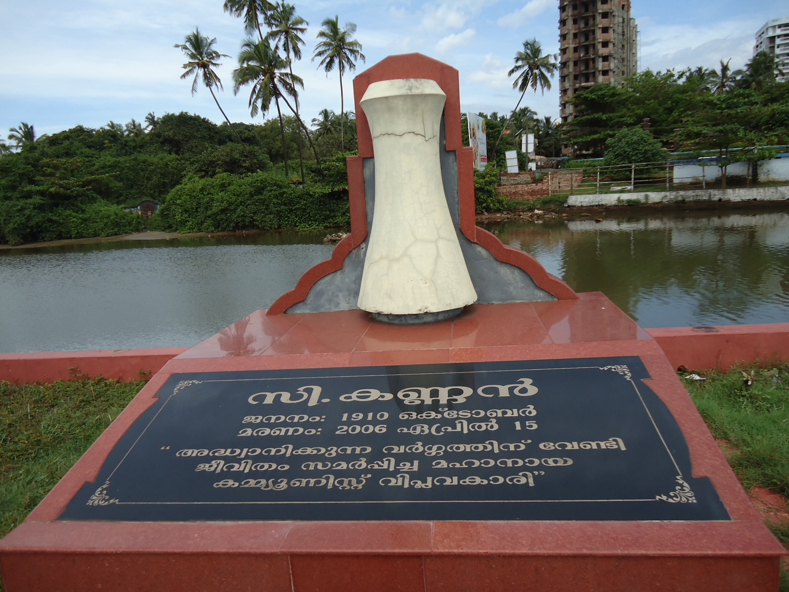 സി കണ്ണന്റെ ശവകുടീരം